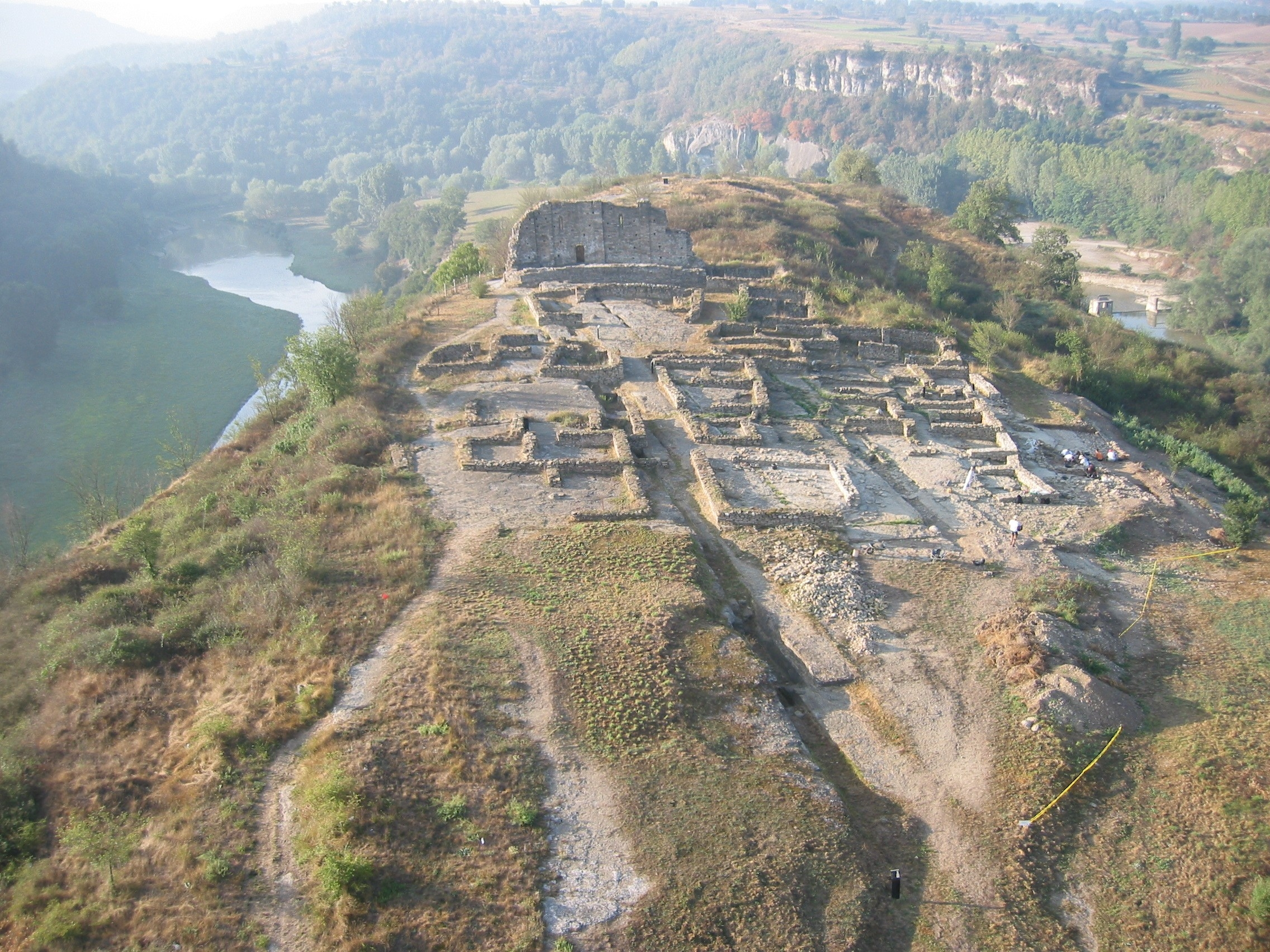 Jaciment arqueològic de l'Esquerda, a les Masies de Roda